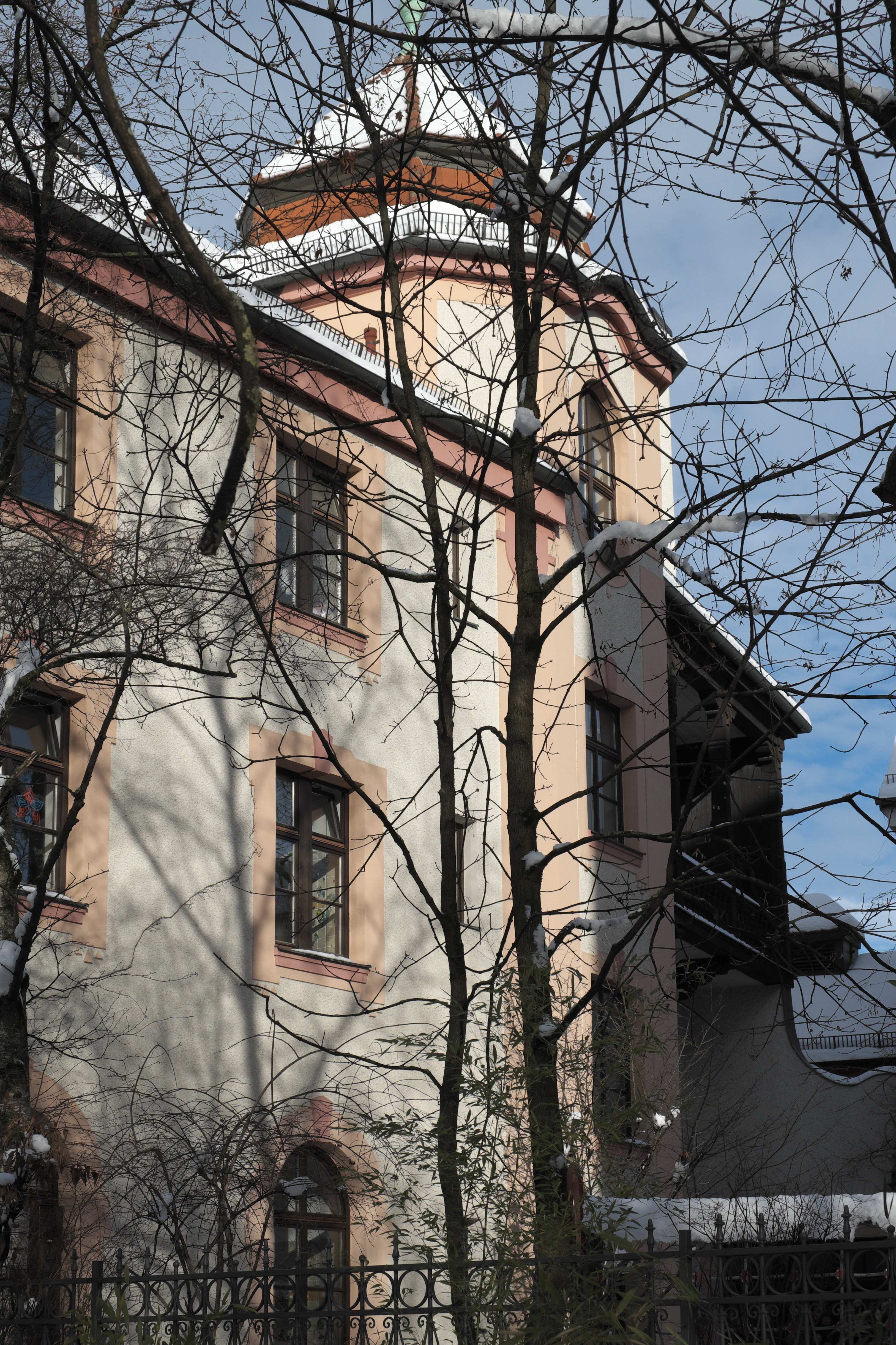 Gebäude in der Kirchenstraße 9 in Haidhausen im Stadtbezirk Au-Haidhausen in München (Bayern/Deutschland), 1894–95 von Carl Hocheder erbaut